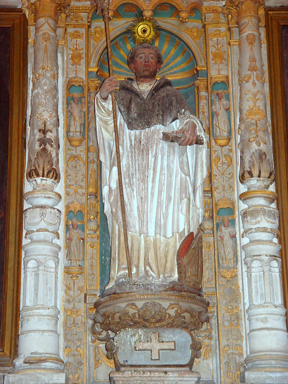 São Teotónio Mosteiro Sta. Cruz Coimbra